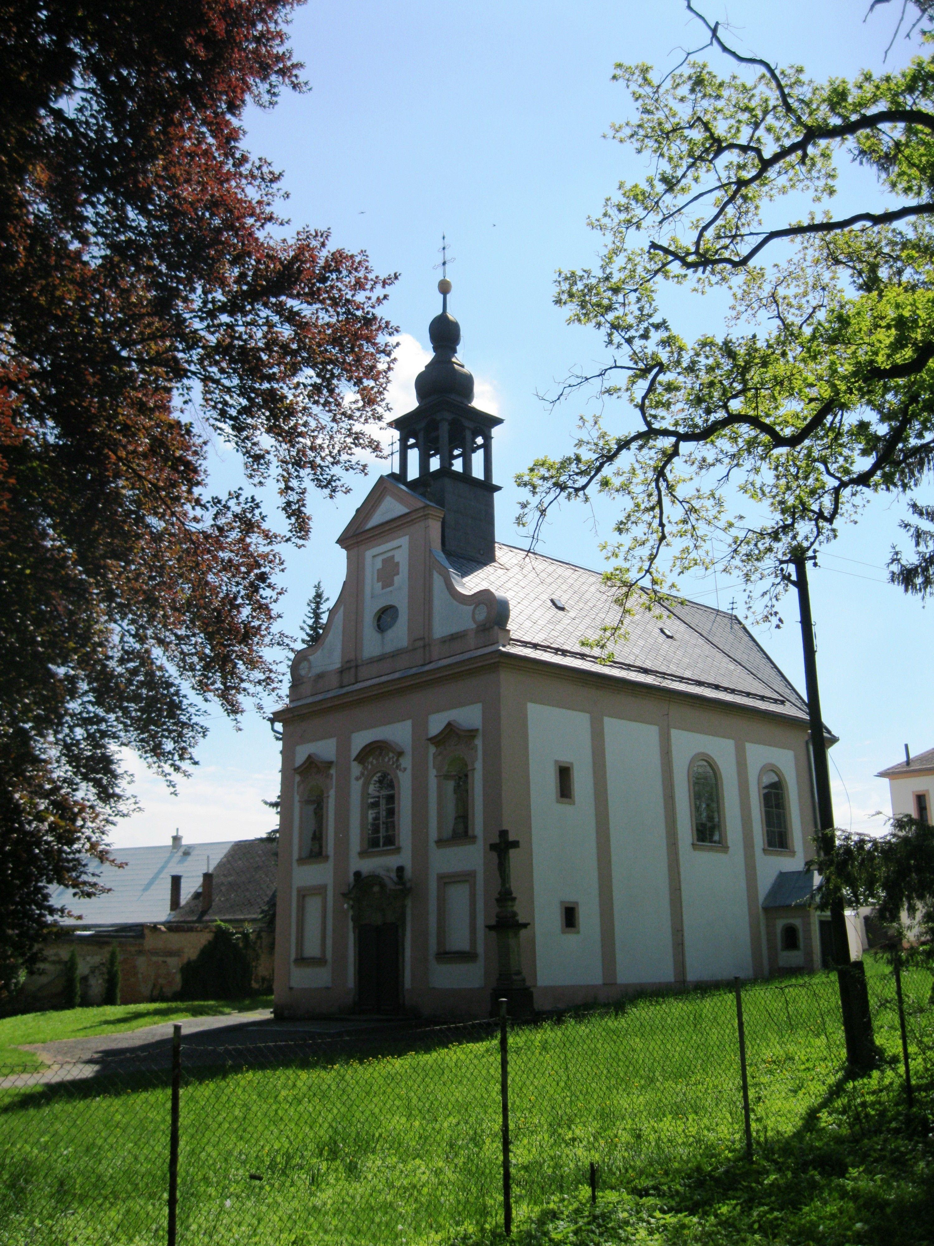 Kostel sv. Františka Serafinského (Chudobín), u zámku, JV konec zámeckého parku, Chudobín